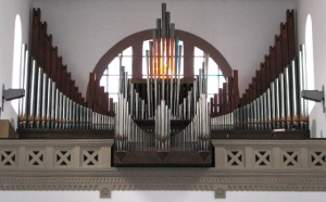 Orgel der St.-Josef-Kirche in Mannheim